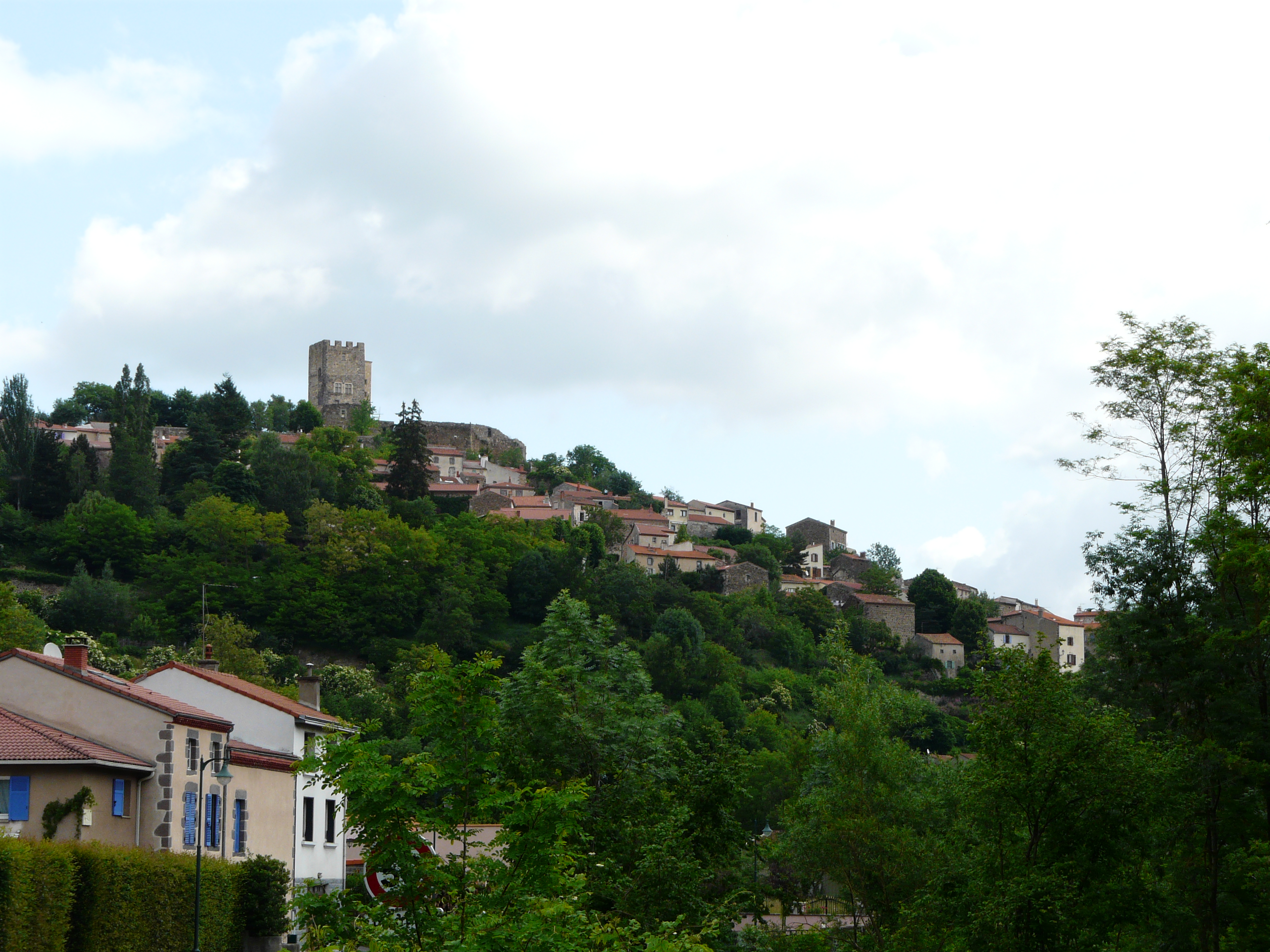 Le village de Montaigut-le-Blanc, Puy-de-Dôme, France.